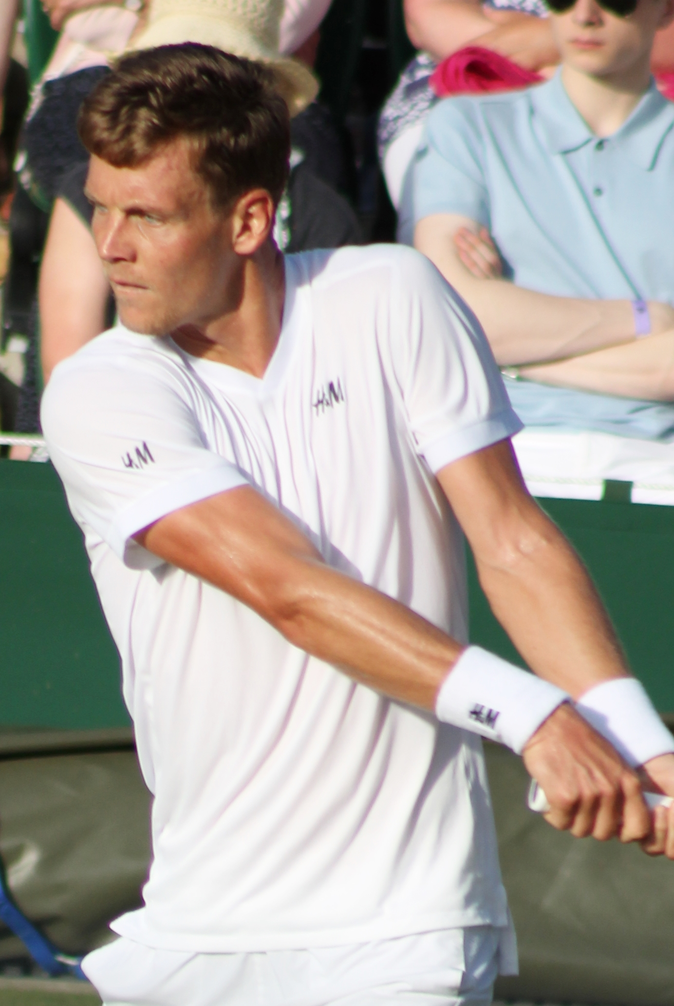 Berdych WM15 (7)